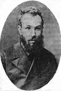 Petr Leont'evic Antonov (1859-1916)